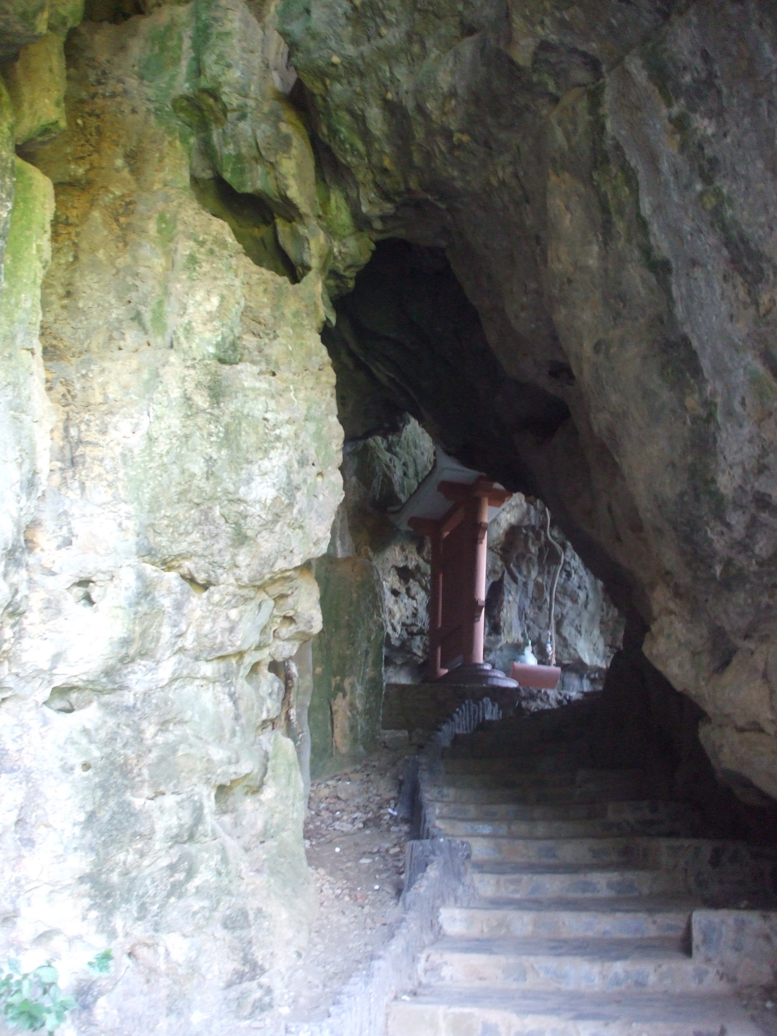 Đường lên đỉnh núi Đá Dựng, Hà Tiên, Việt Nam.